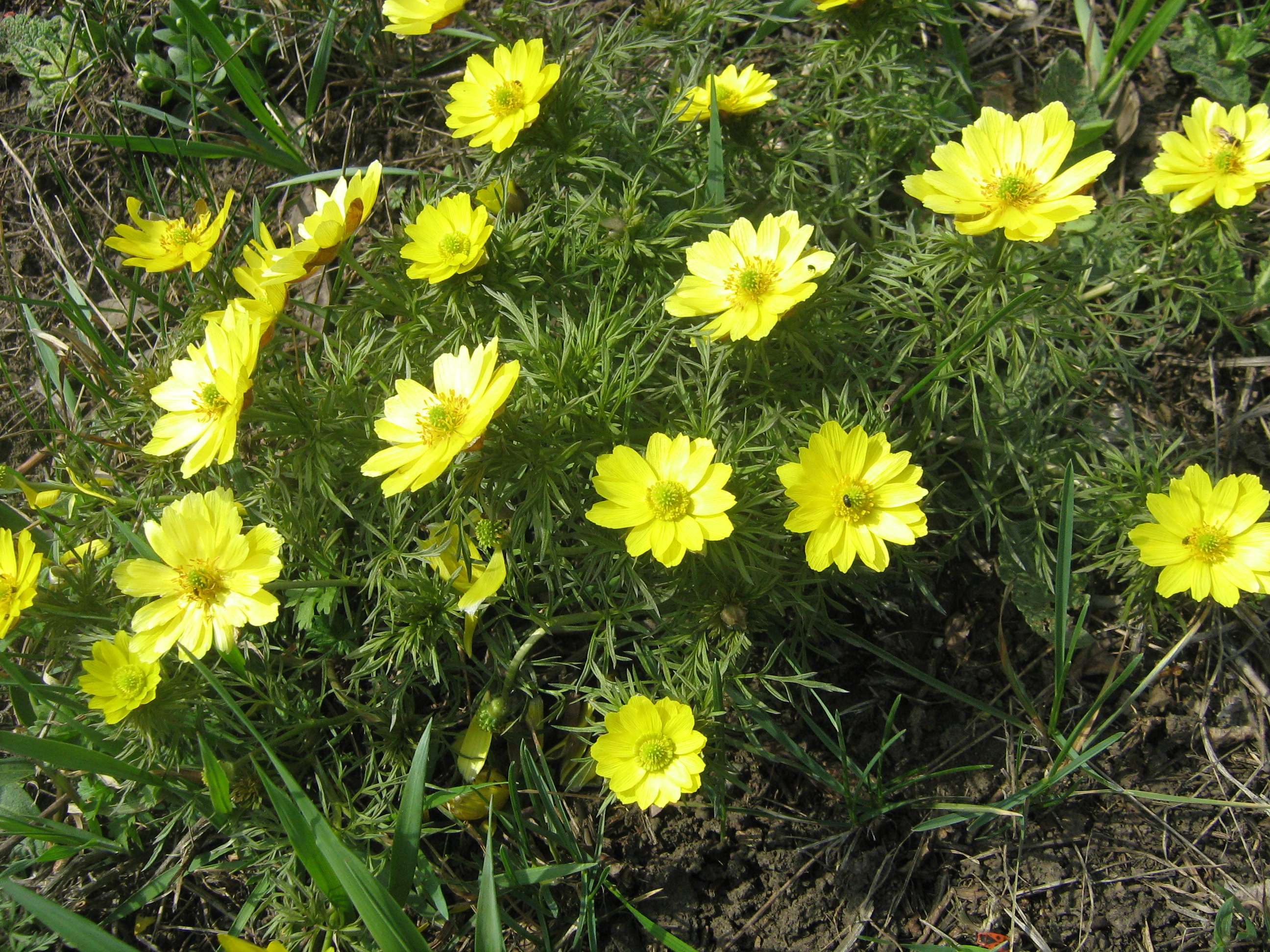 Адонис волжский (Adonis wolgensis Steven)